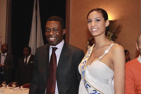 Patrick Lozès et Chloé Mortaud, Miss France 2009 au dîner annuel du CRAN le 5 février 2009.